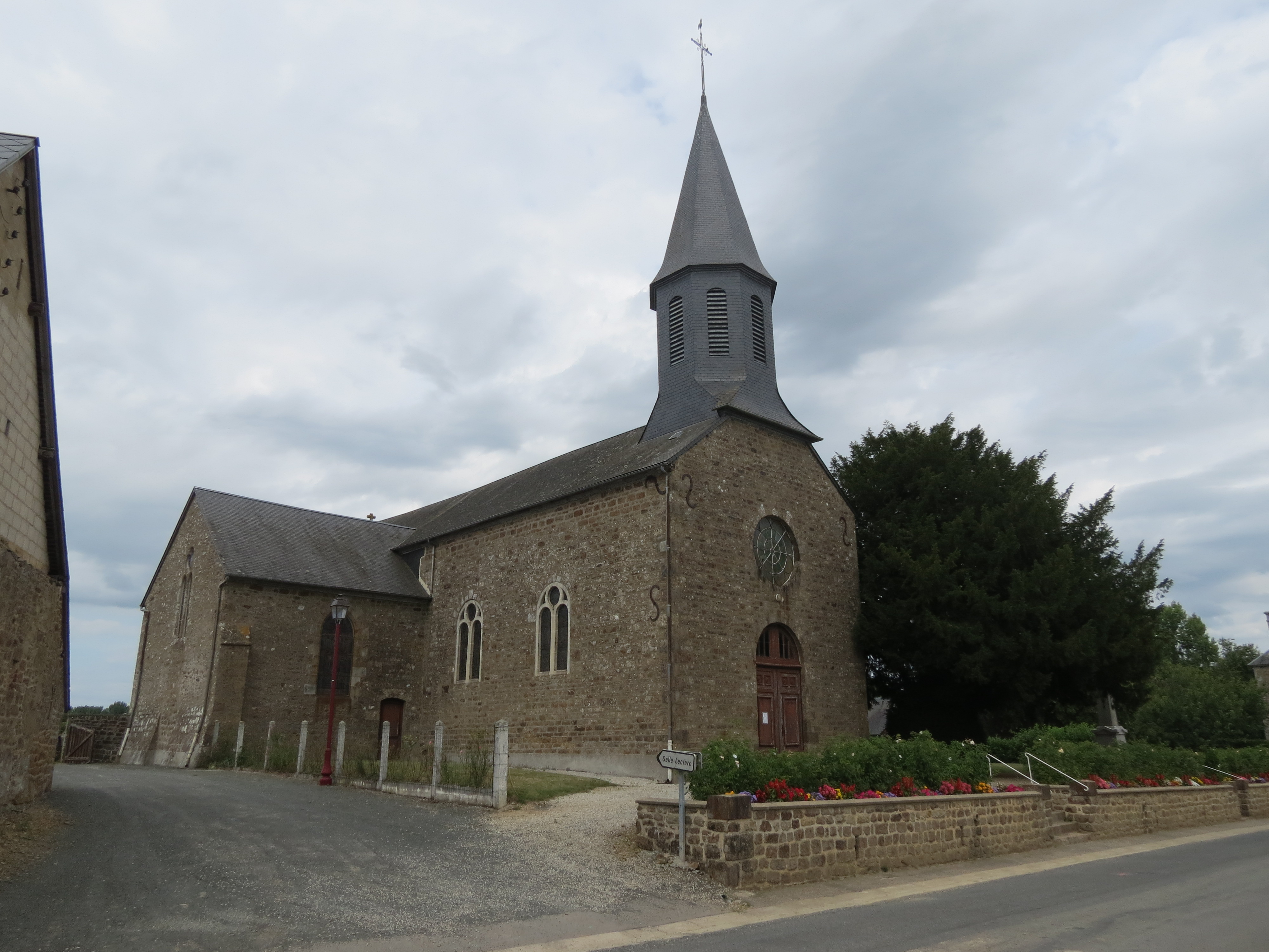 Église Notre-Dame-de-l'Assomption de Torchamp.